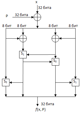 схема поиска функции